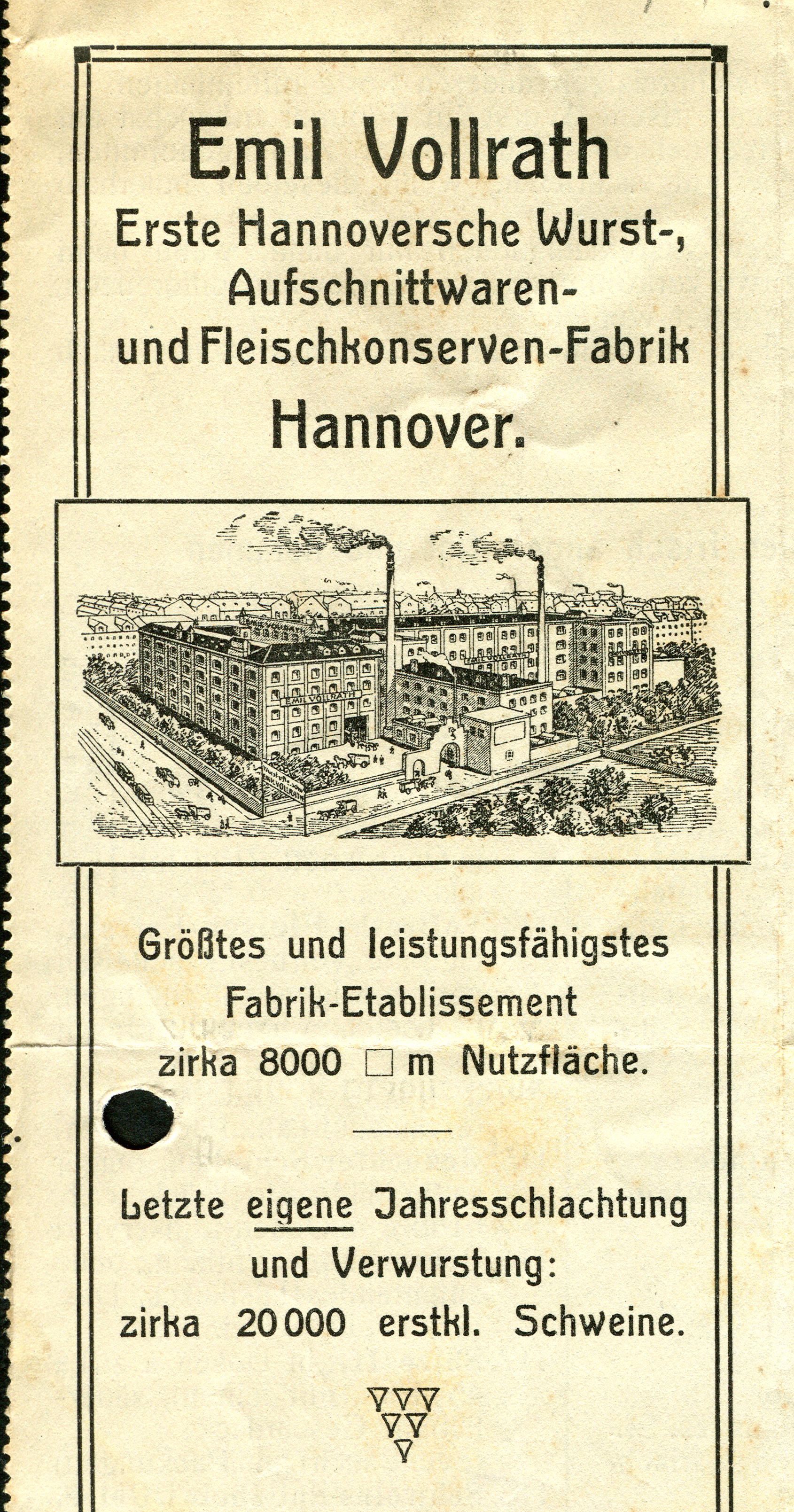 Ausschnitt aus einer Rechnung, handschriftlich datiert 1914 mit einer Vogelschau der Fabrikanlagen und Gebäude der Firma Emil Vollrath, Hannover